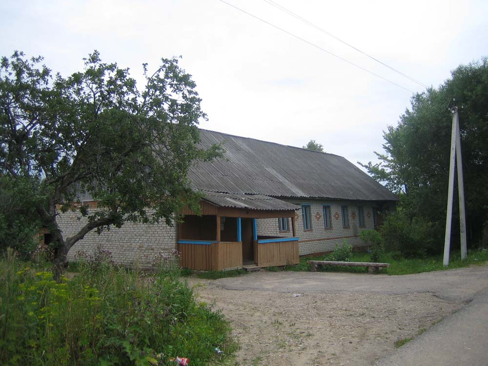 Каснянский дом культуры (клуб)